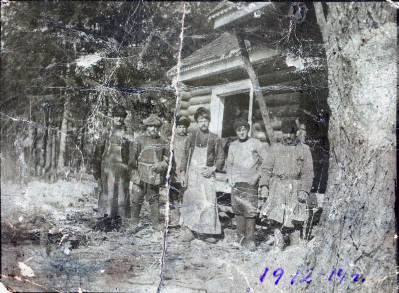 Плотницкая артель 1912—1914, Рязанская губерния, Егорьевский уезд, в центре Иван Боголюбов